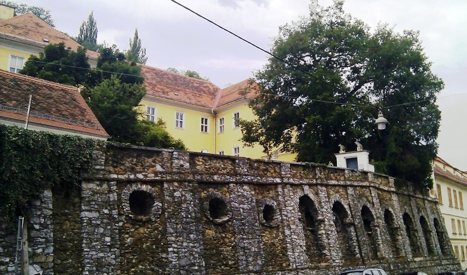 Auffahrtsrampe zur Palmburg mit Gedenktafel, Paulustorgasse, Graz